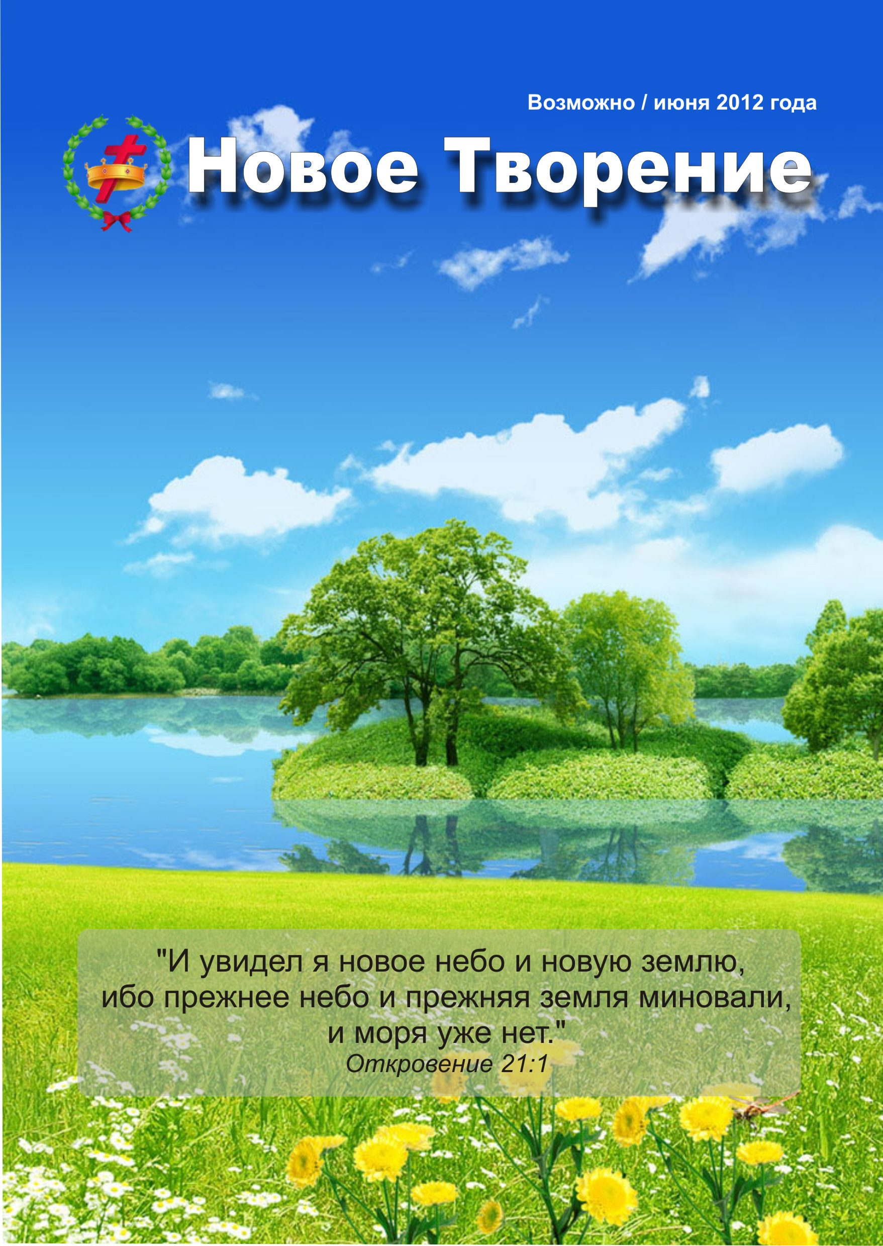 Zeitschrift "Die Neue Schöpfung"